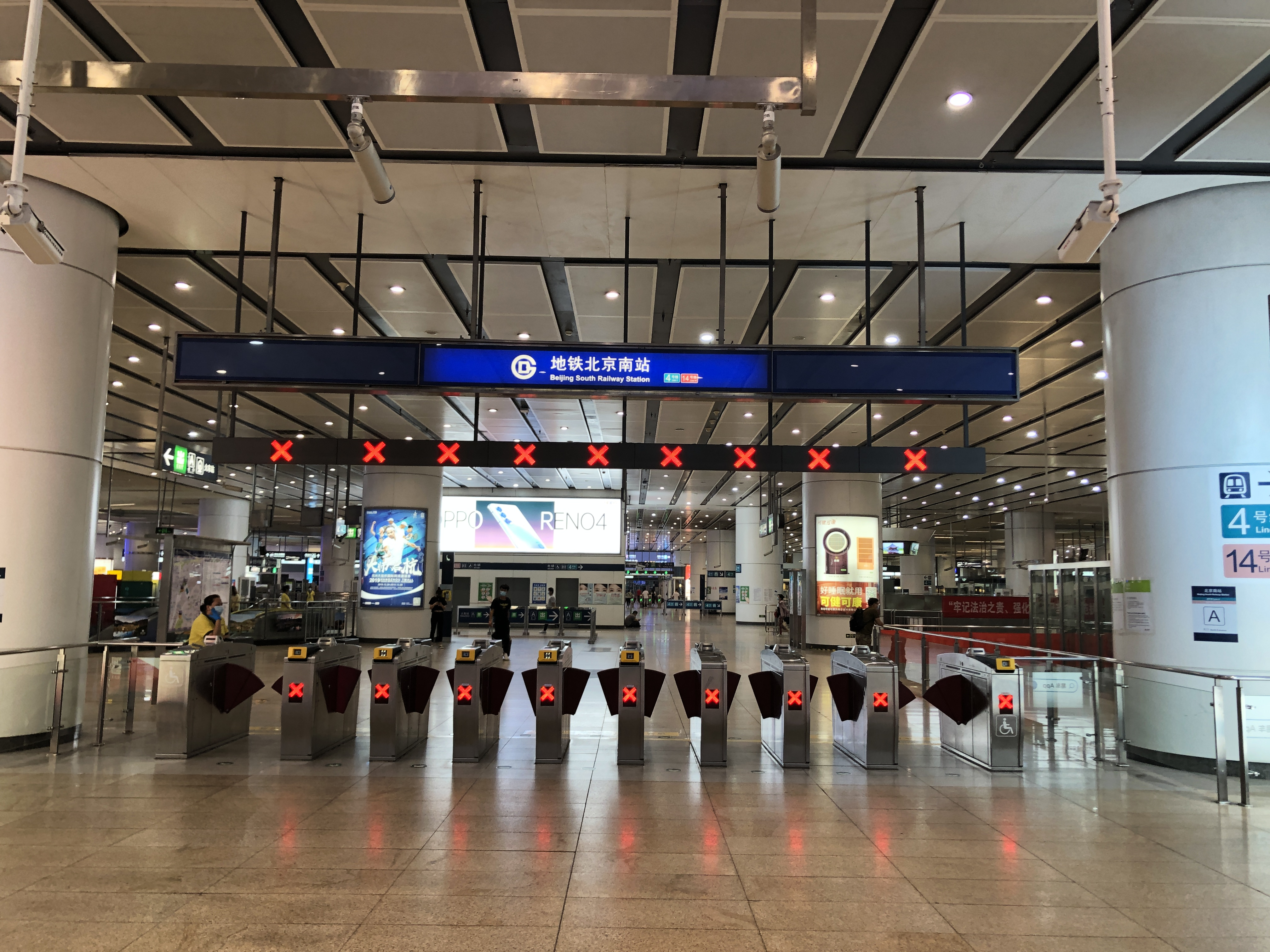 中文（中国大陆）: 北京地铁北京南站A口